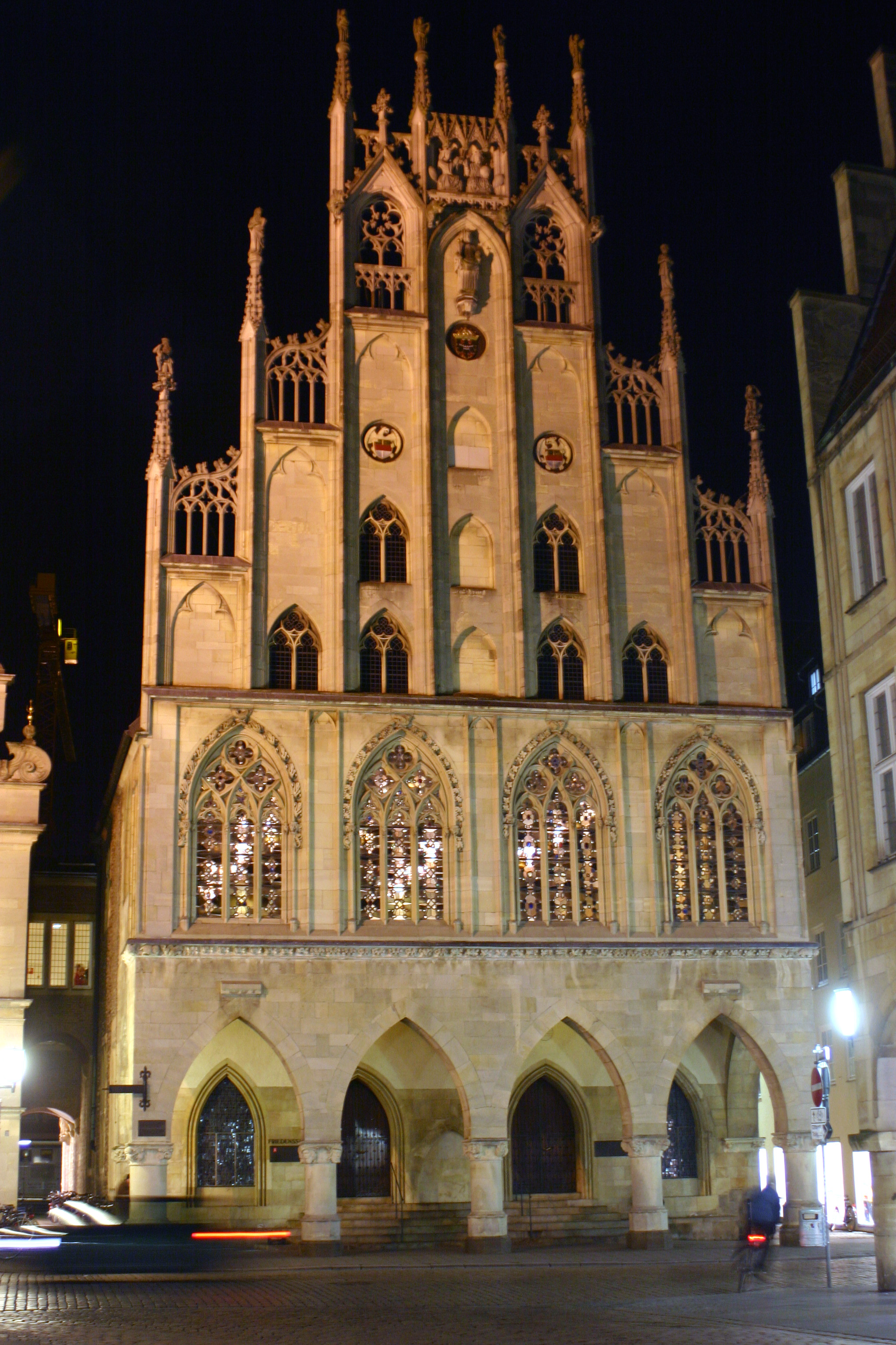 Münster, Historisches Rathaus